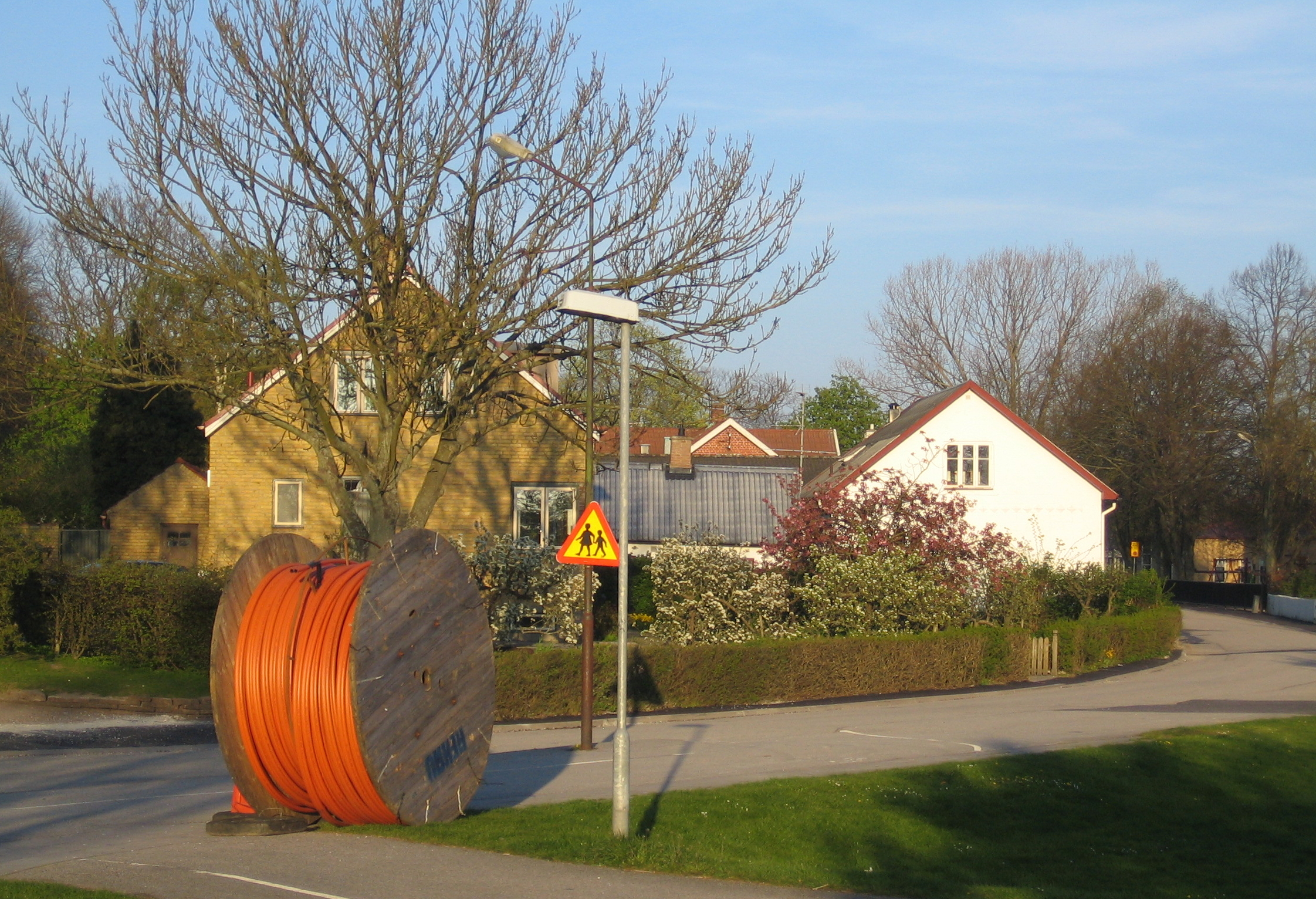 Rostorp, Malmö